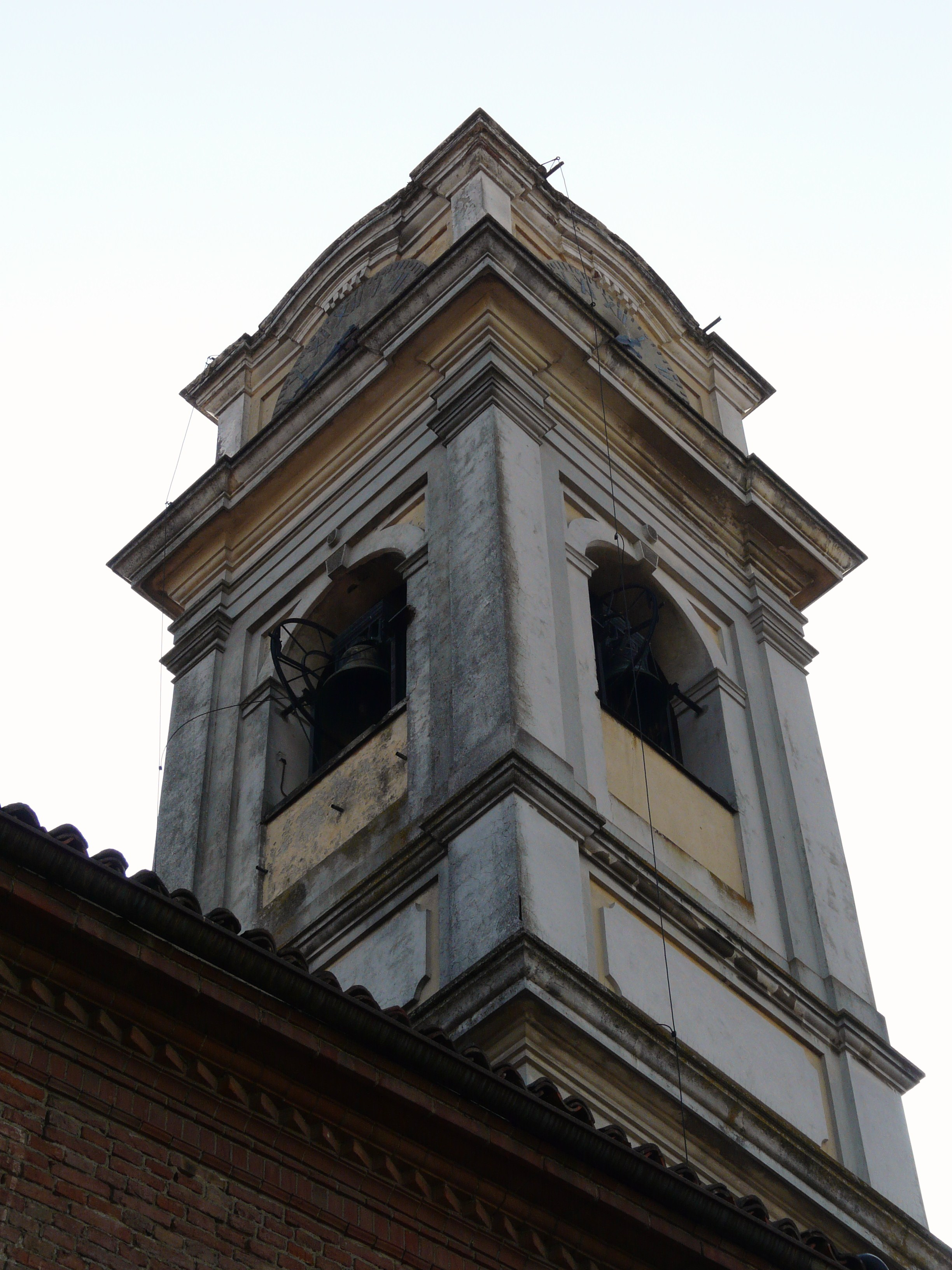 Campanile della chiesa di San Siro, Castelletto Monferrato, Piemonte, Italia